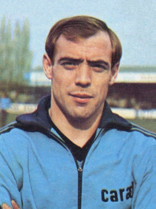 CALCIATORI 1975-76 Panini - Figurina-Sticker n. 628 - LAMBERT